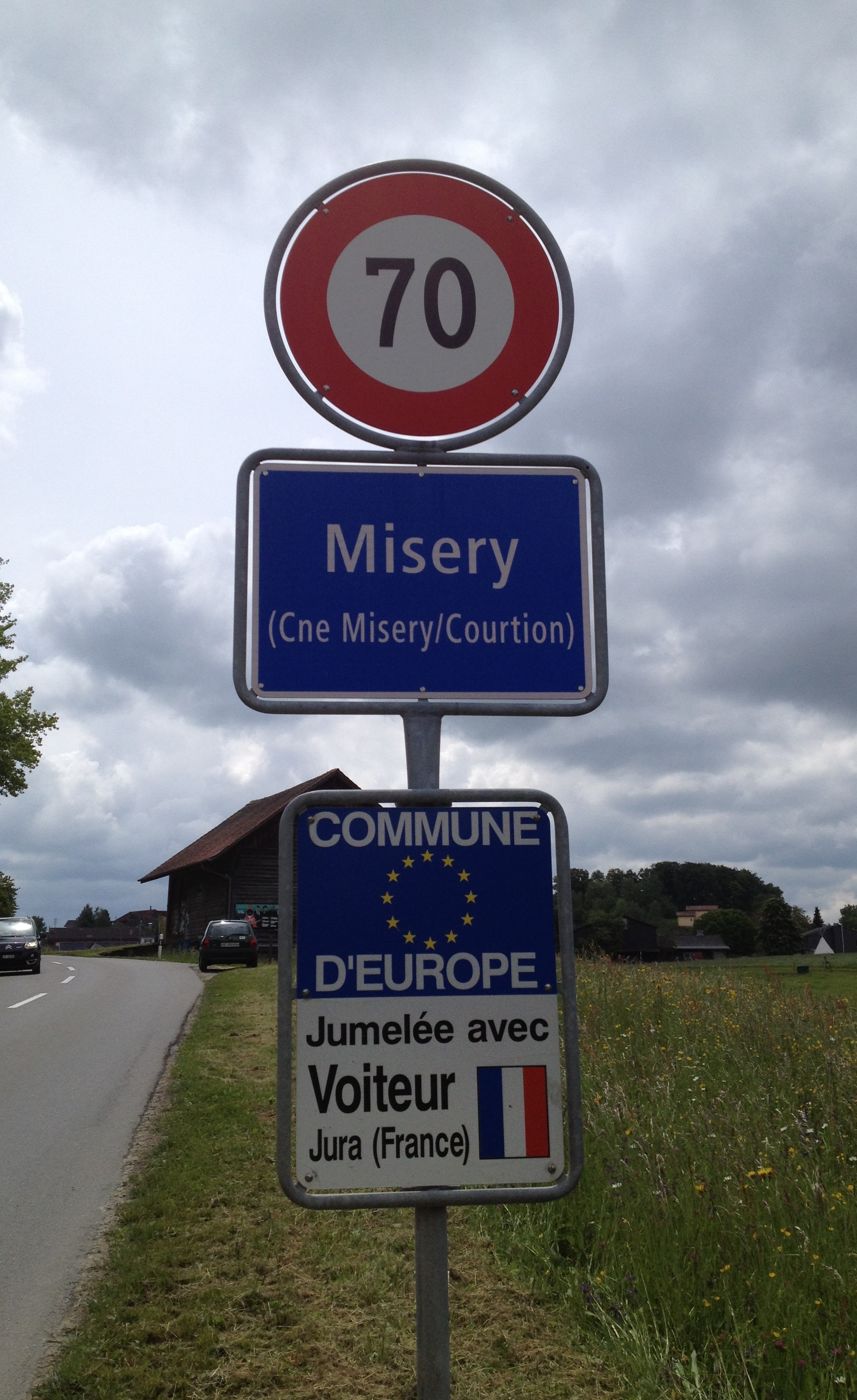 Panneau à l'entrée de la localité de Misery, canton de Fribourg, Suisse